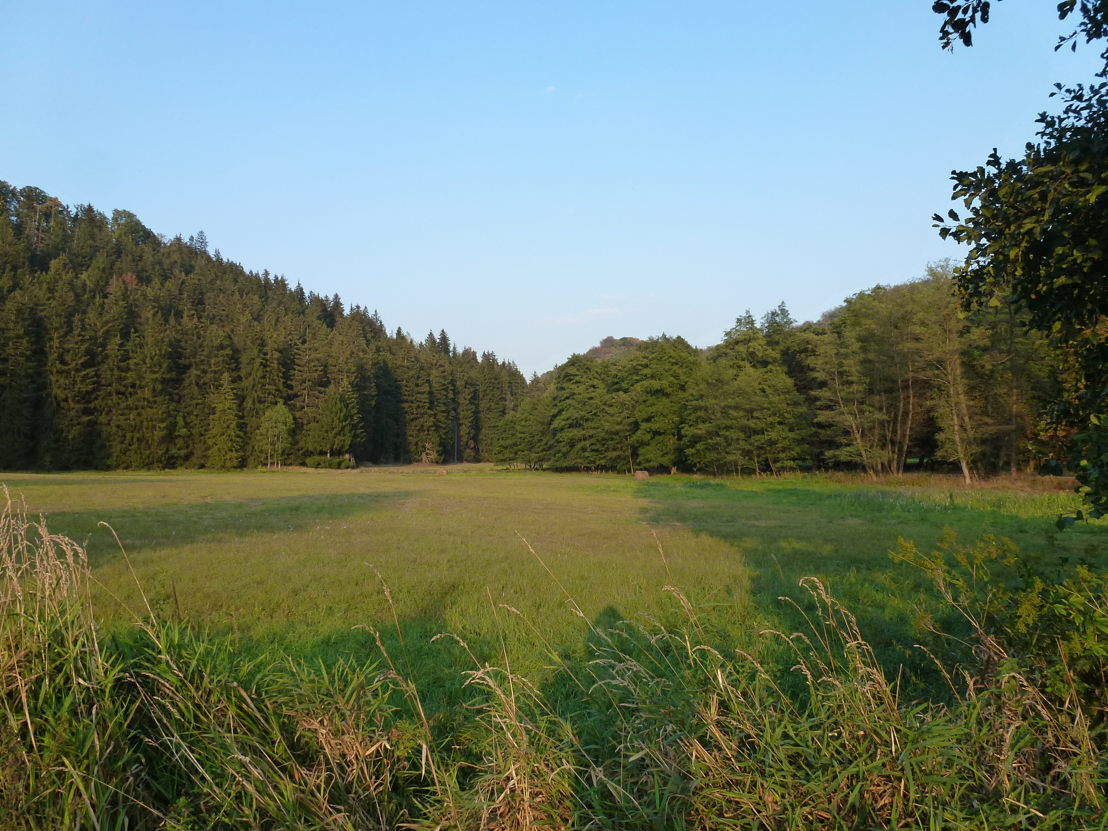 Nördlicher Blick ins Selketal vom Abzweig ins Lange Tal.